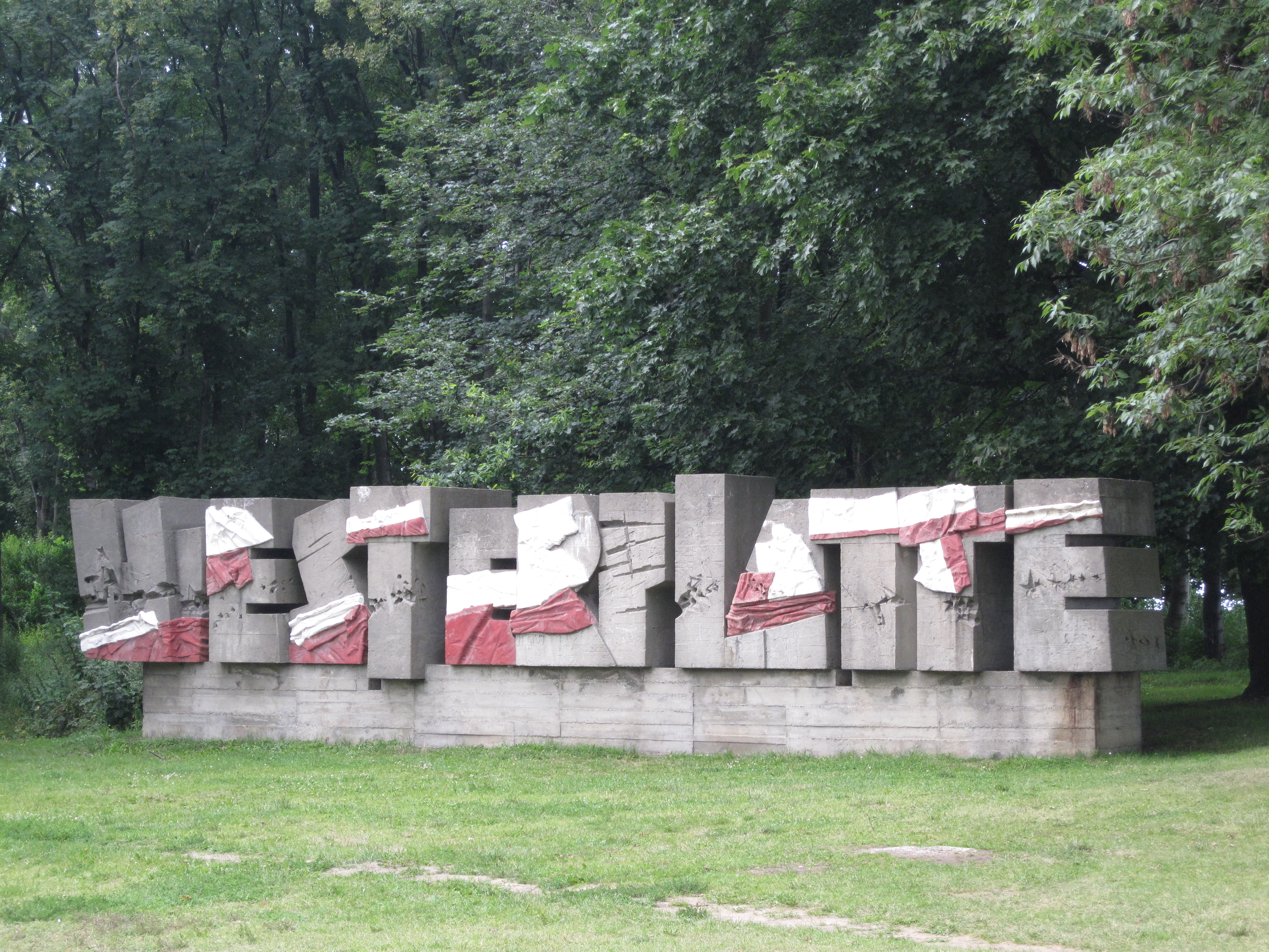 Westerplatte